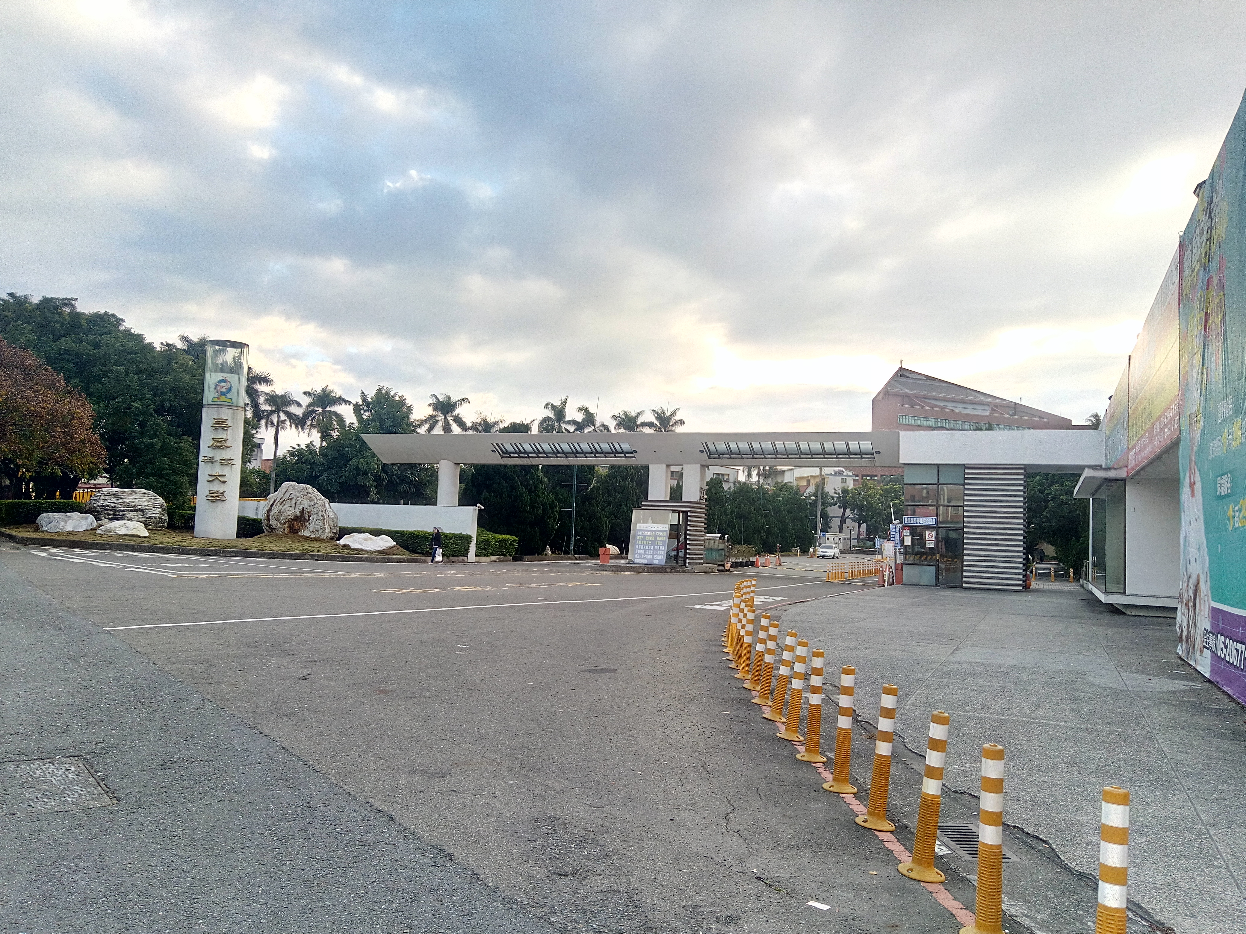 呉鳳科技大学の正門